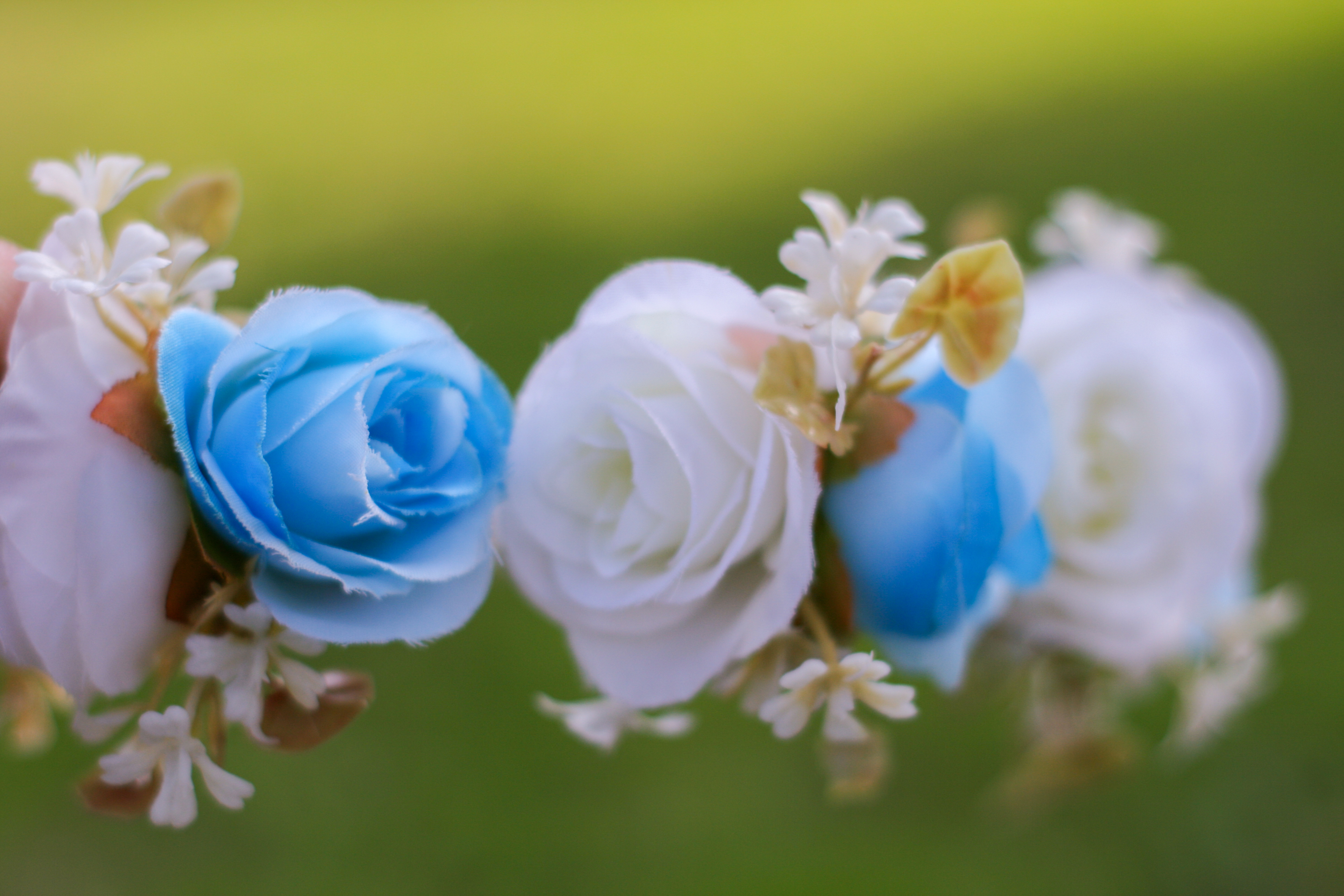 צילום של זר פרחים בעל עומק שדה קטן. צולם בפארק הירדן בינואר 2016.